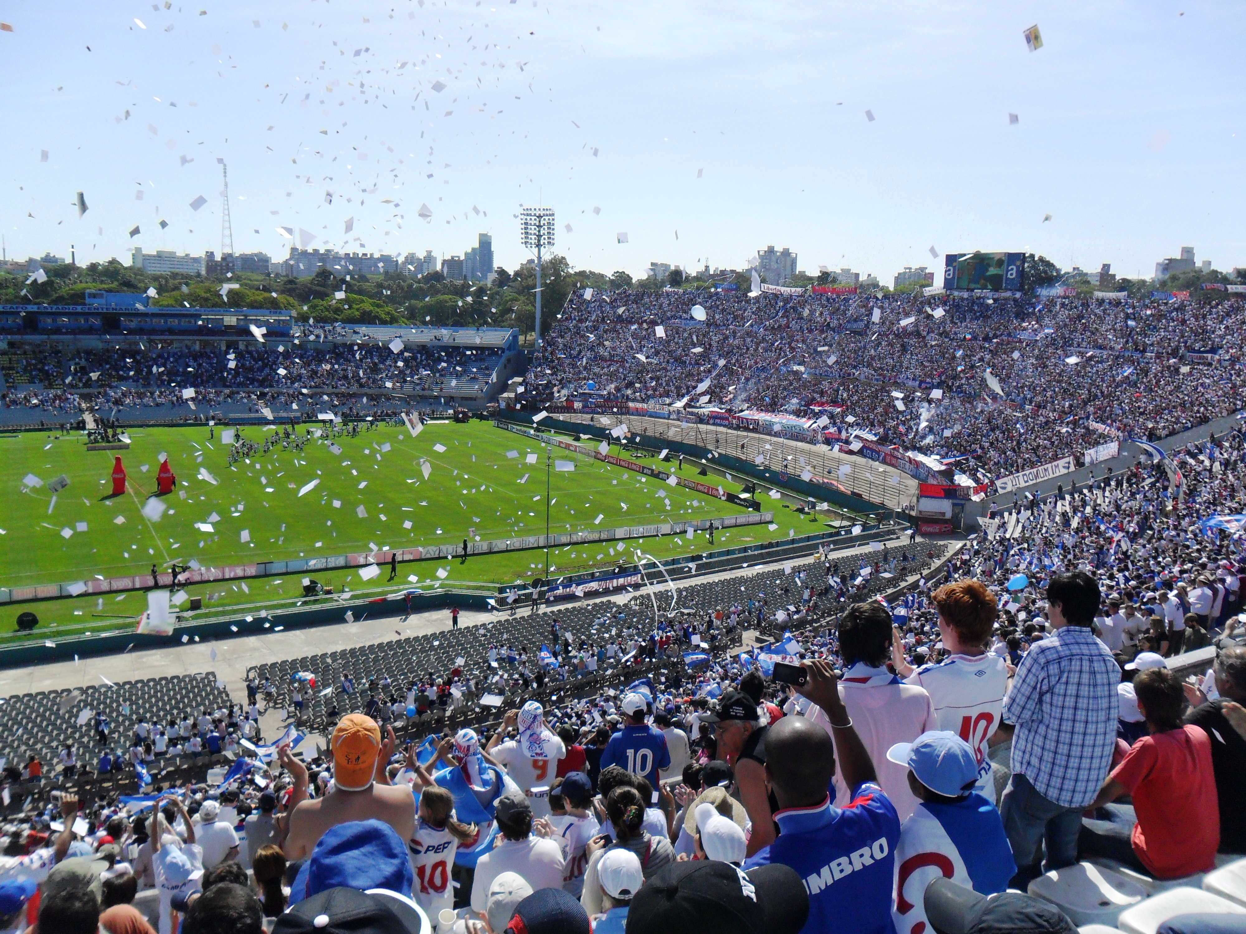 Encuentro entre Liverpool y Nacional, disputado el 4 de diciembre de 2011 en el Estadio Centenario por el Torneo Uruguayo